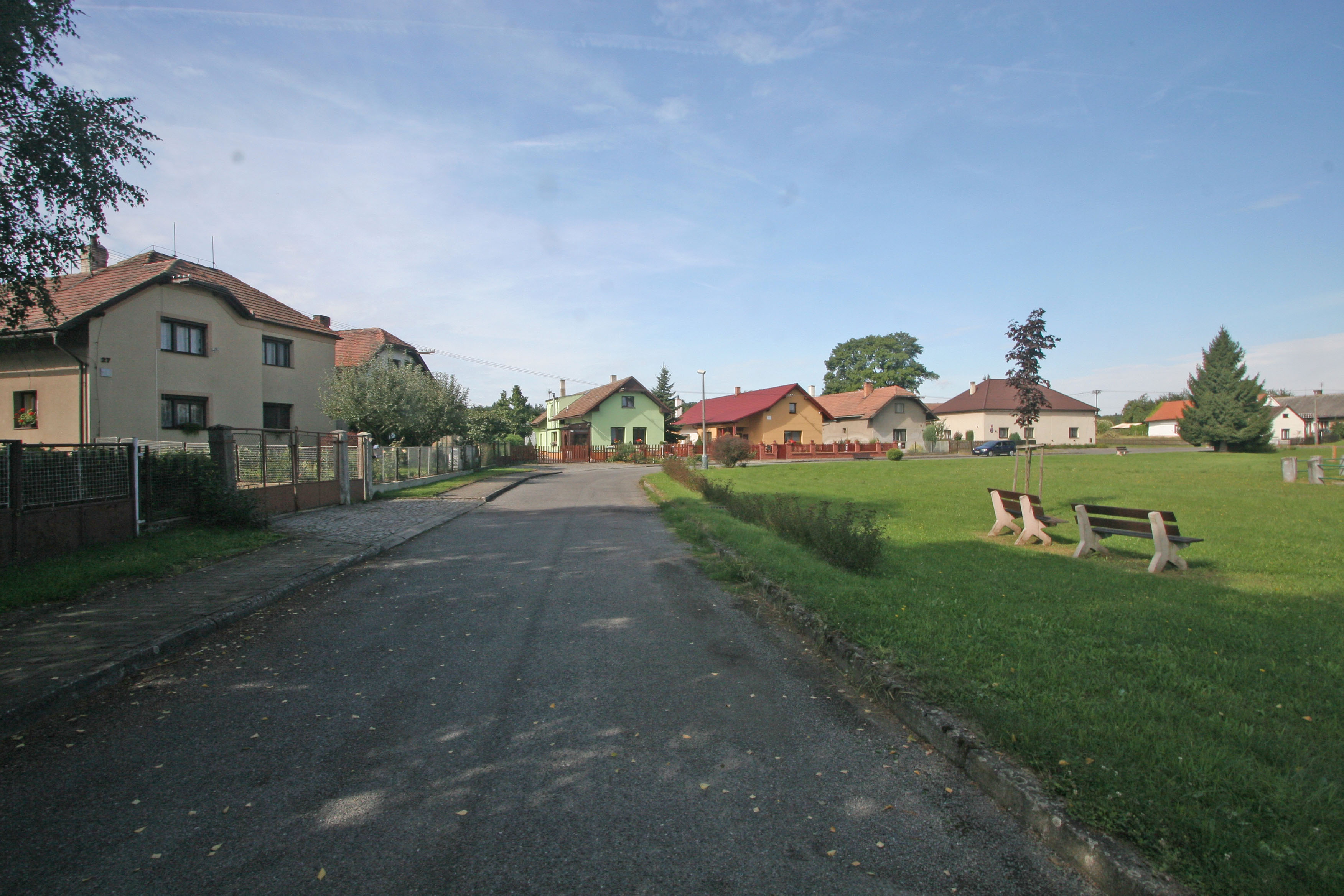 Urbanice čp. 27